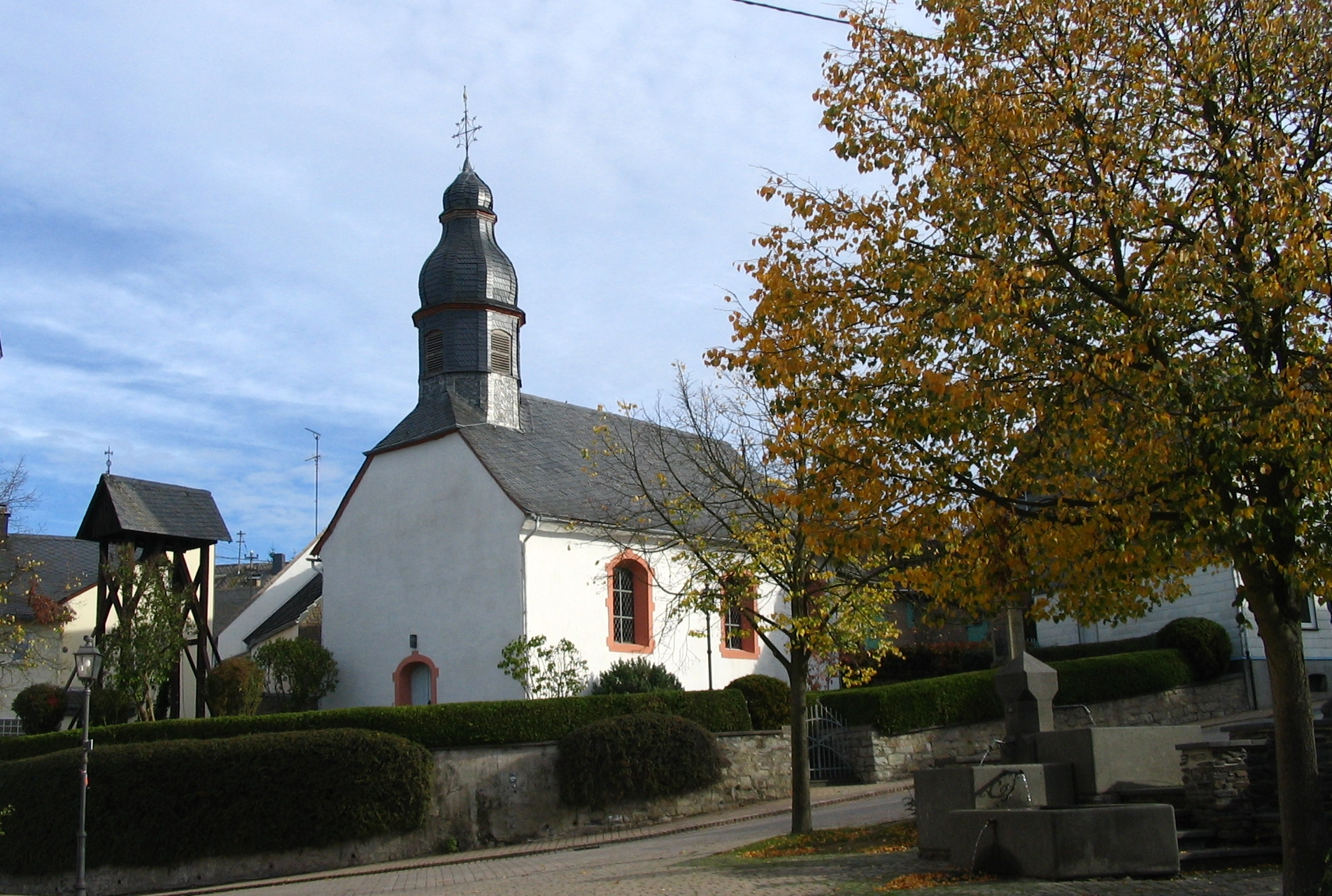 Kapelle Mutterschied/Hunsrück